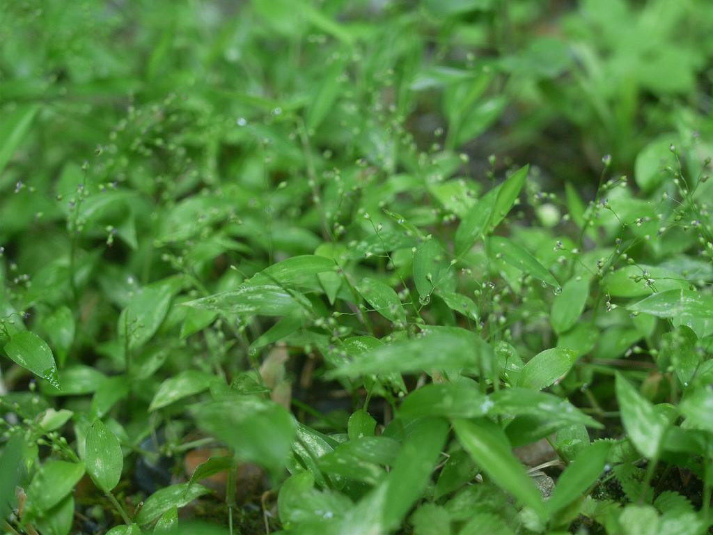 Isachne nipponensis：ハイチゴザサ 2008/09/27 和歌山県田辺市：Tanabe City. Wakayama Pref. Japan